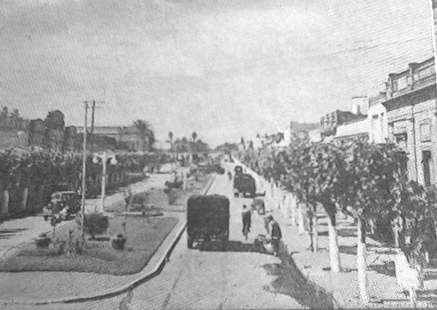 Avenida del Libertador San Martín, Merlo's main street, Merlo, Buenos Aires Province, around 1950.